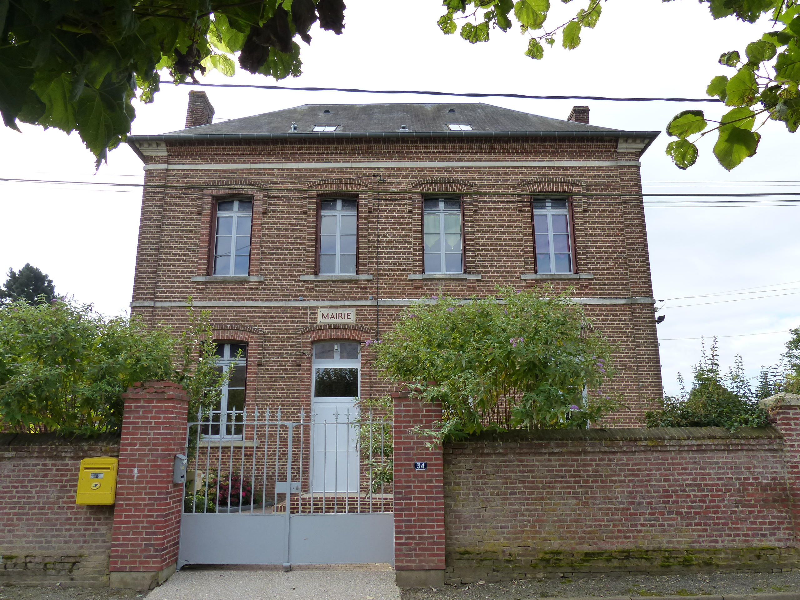 Mairie de Choqueise-les-Bénard